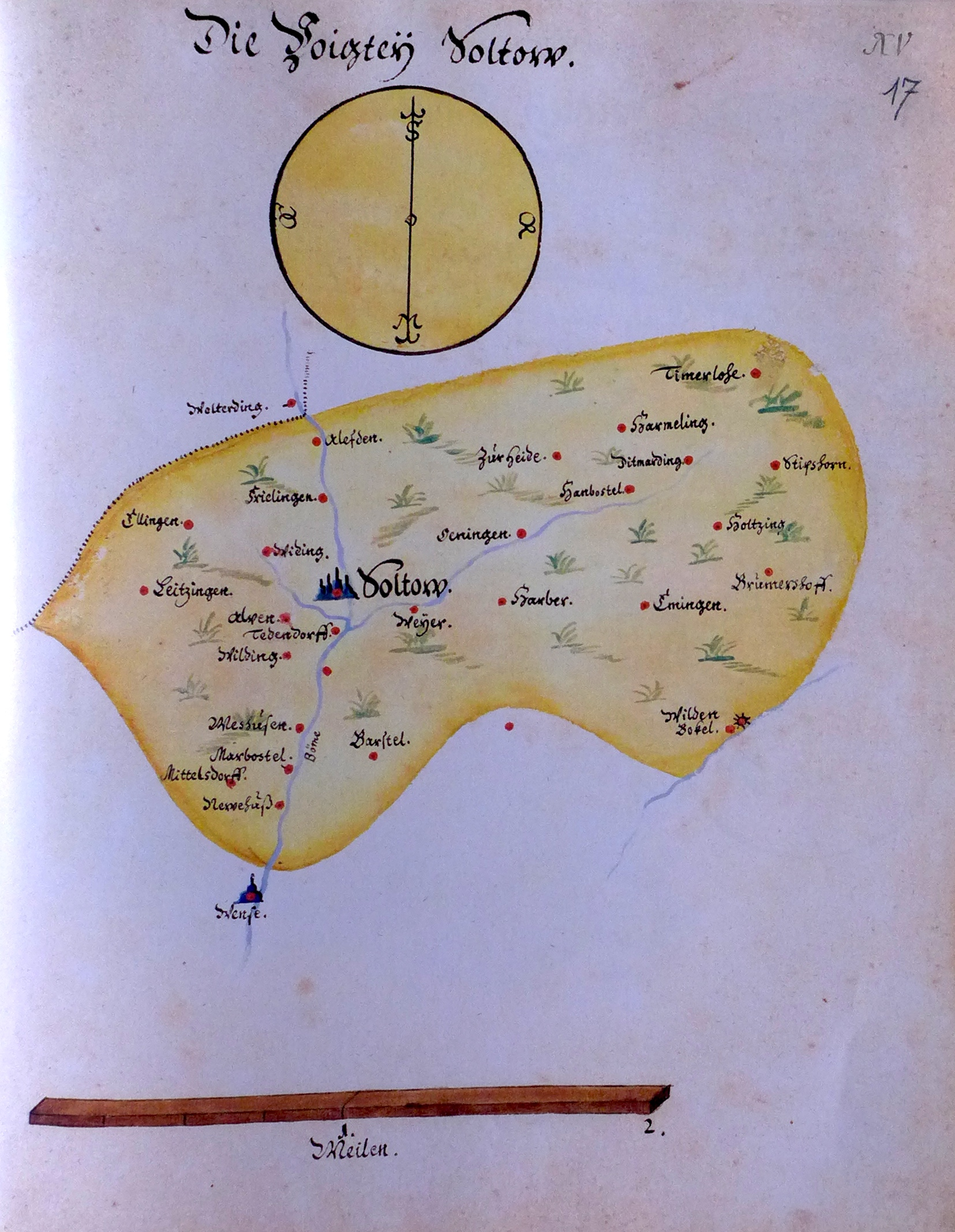 Ämteratlas des Fürstentums Lüneburg von Johannes Mellinger, um 1600 – Reproduktion der im Niedersächsischen Landesarchiv, Abteilung Hannover, lagernden Kopie um 1678 (vgl.